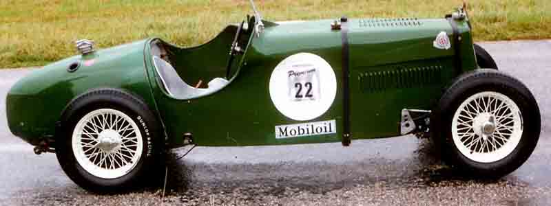 M.G. K1 Magnette 2-Seater Racer 1933